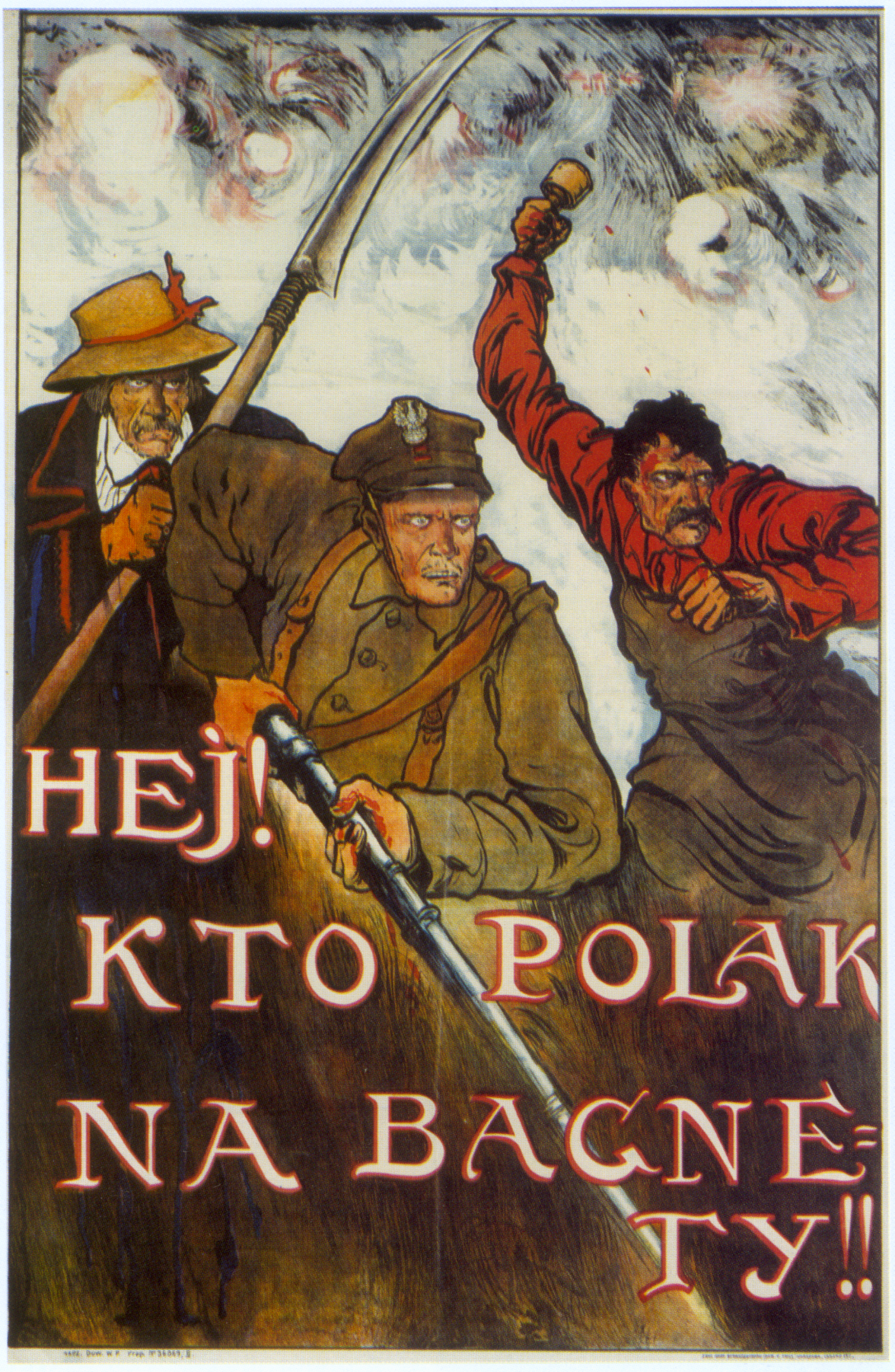 lepsza wesje plakatu: Na bagnety.jpg